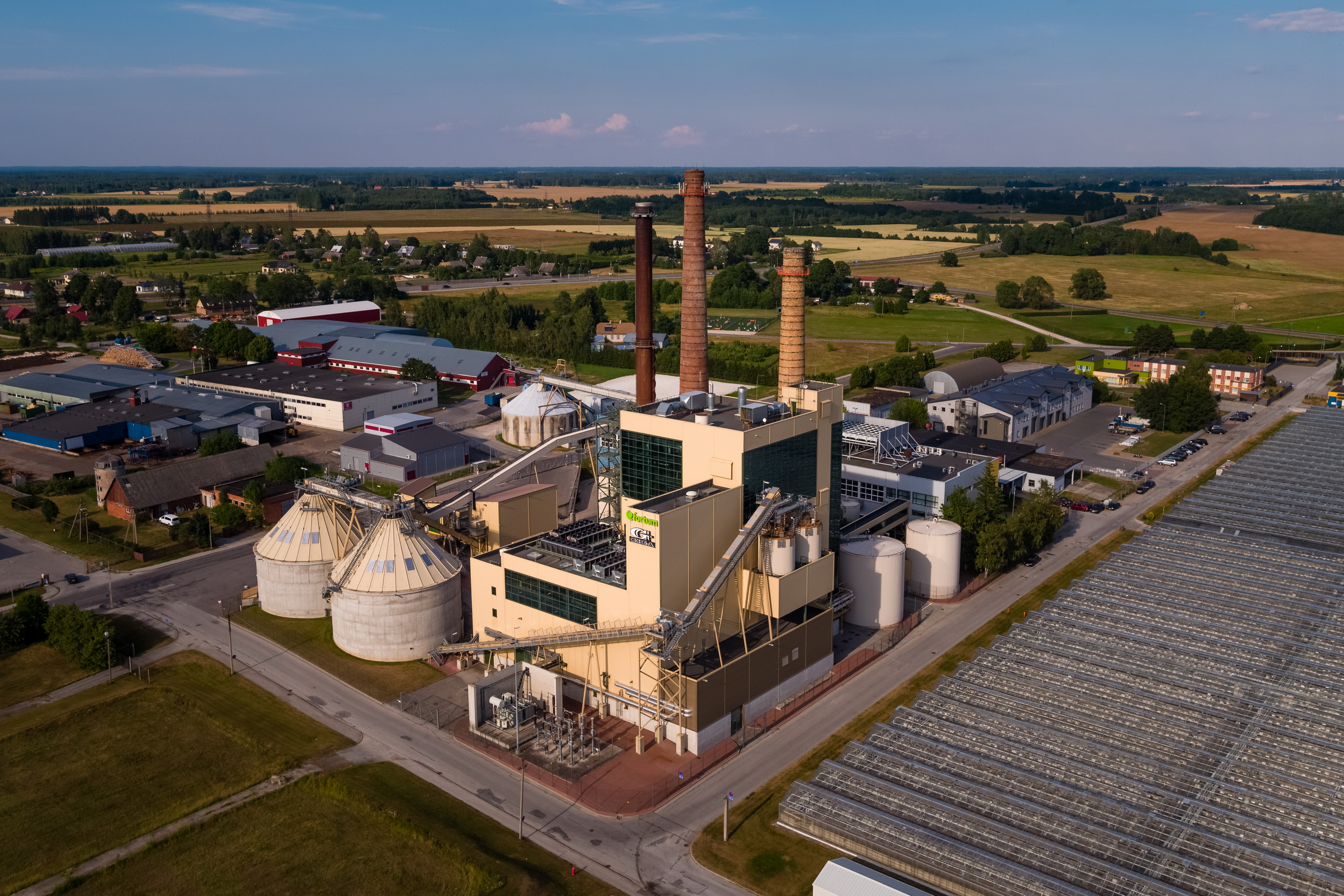 Tartu Elektrijaam